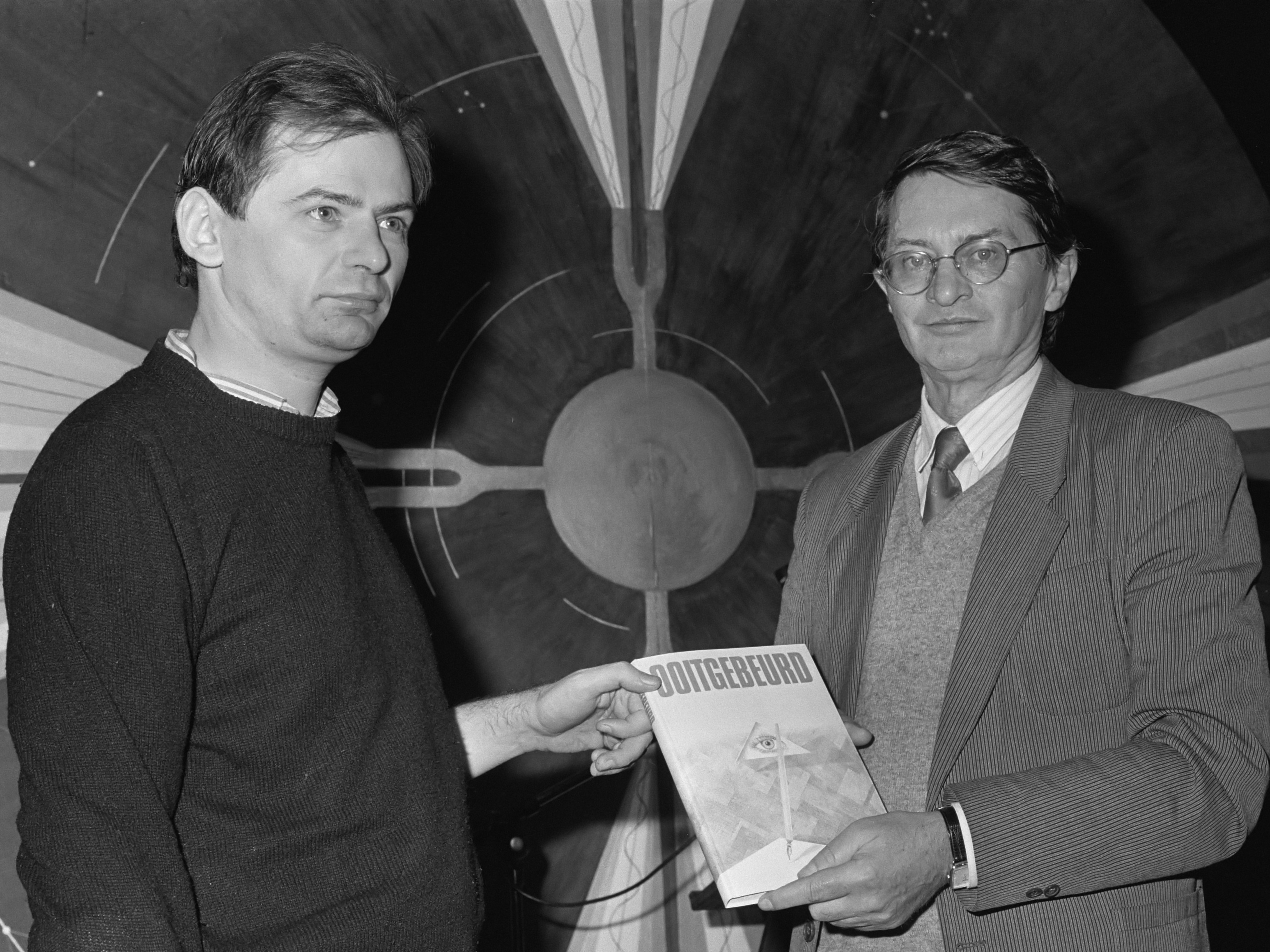 Presentatie boekje "Ooit gebeurd" ; samensteller Rudie Kagie (l) en mede-auteur Remco Campert 18 november 1986